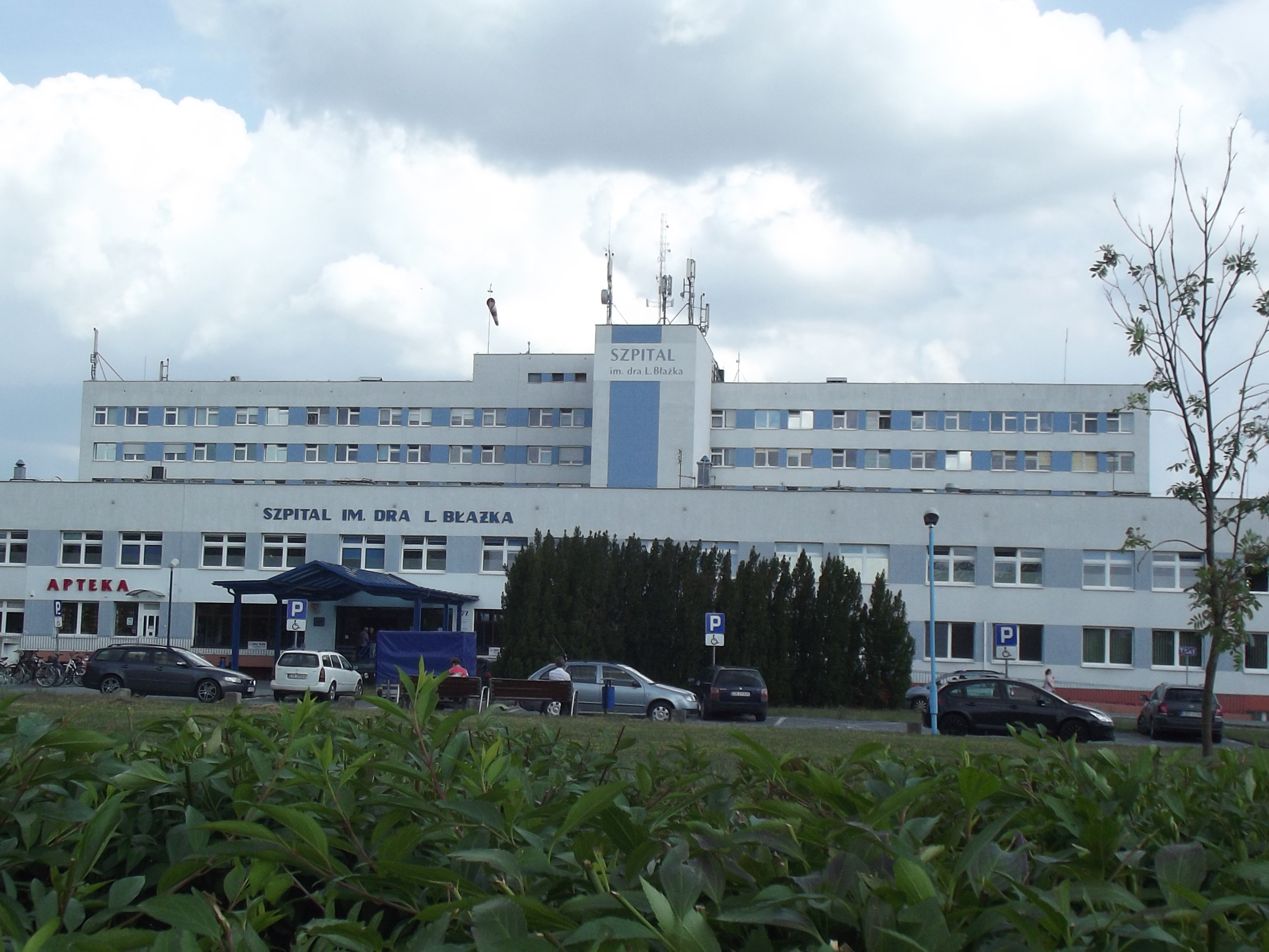 Szpital Wielospecjalistyczny im. dr. L. Błażka w Inowrocławiu